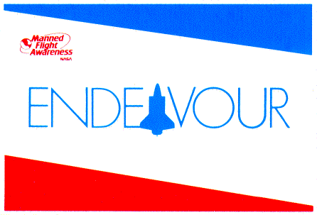 Logo der Raumfähre Endeavour